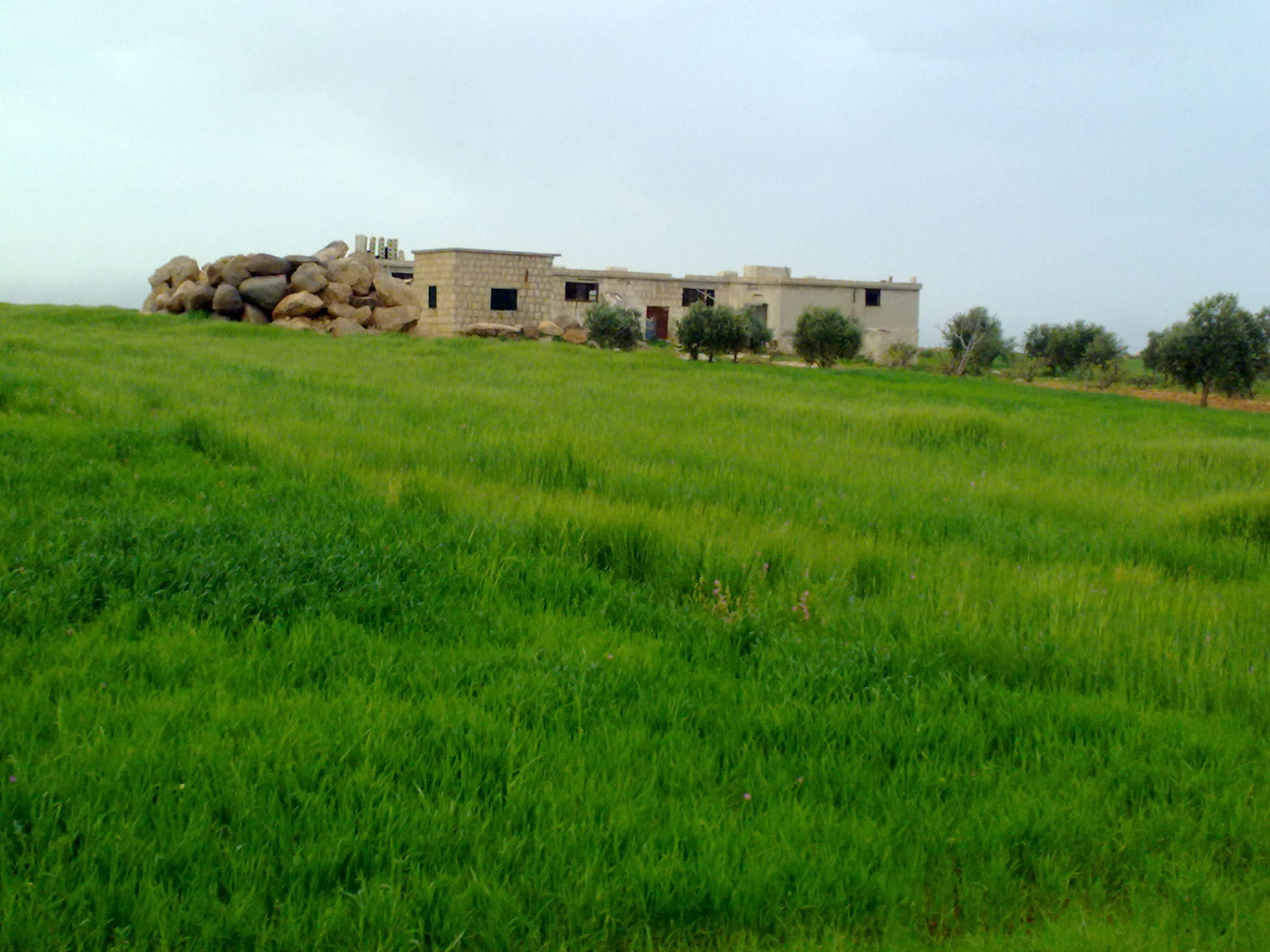 بساتين الغدفة